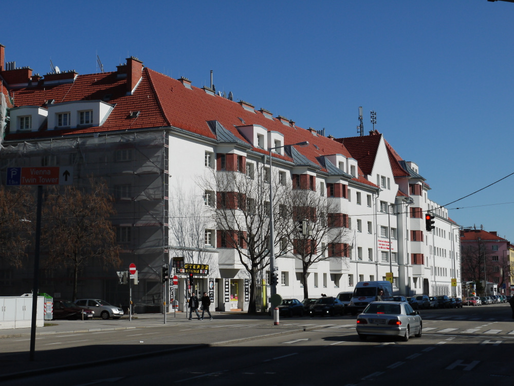 Gemeindebau Am Wienerberg